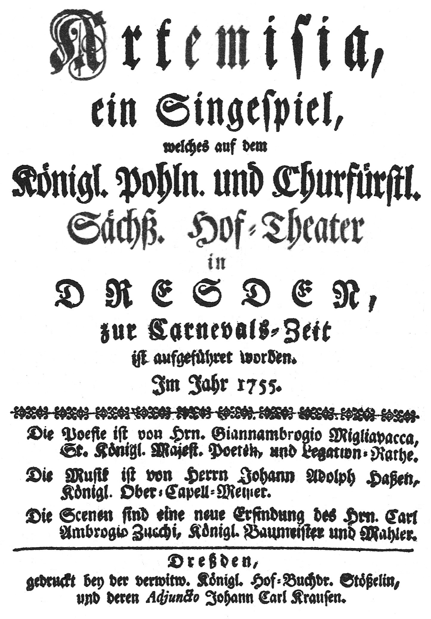 Titelseite der Erstausgabe des Librettos zu der Oper „Artemisia“ von Johann Adolph Hasse. Text: Giovanni Ambrogio Migliavacca. Dresden 1755.